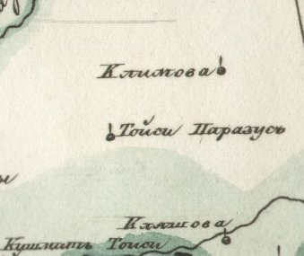 Село Климова и ближайшие населённые пункты. Специальная карта Западной части Российской Империи. Масштаб: 10 верст в дюйме.